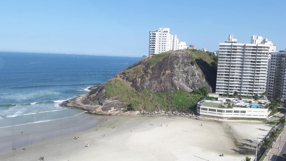 Praia de areia branca e ondas baixas